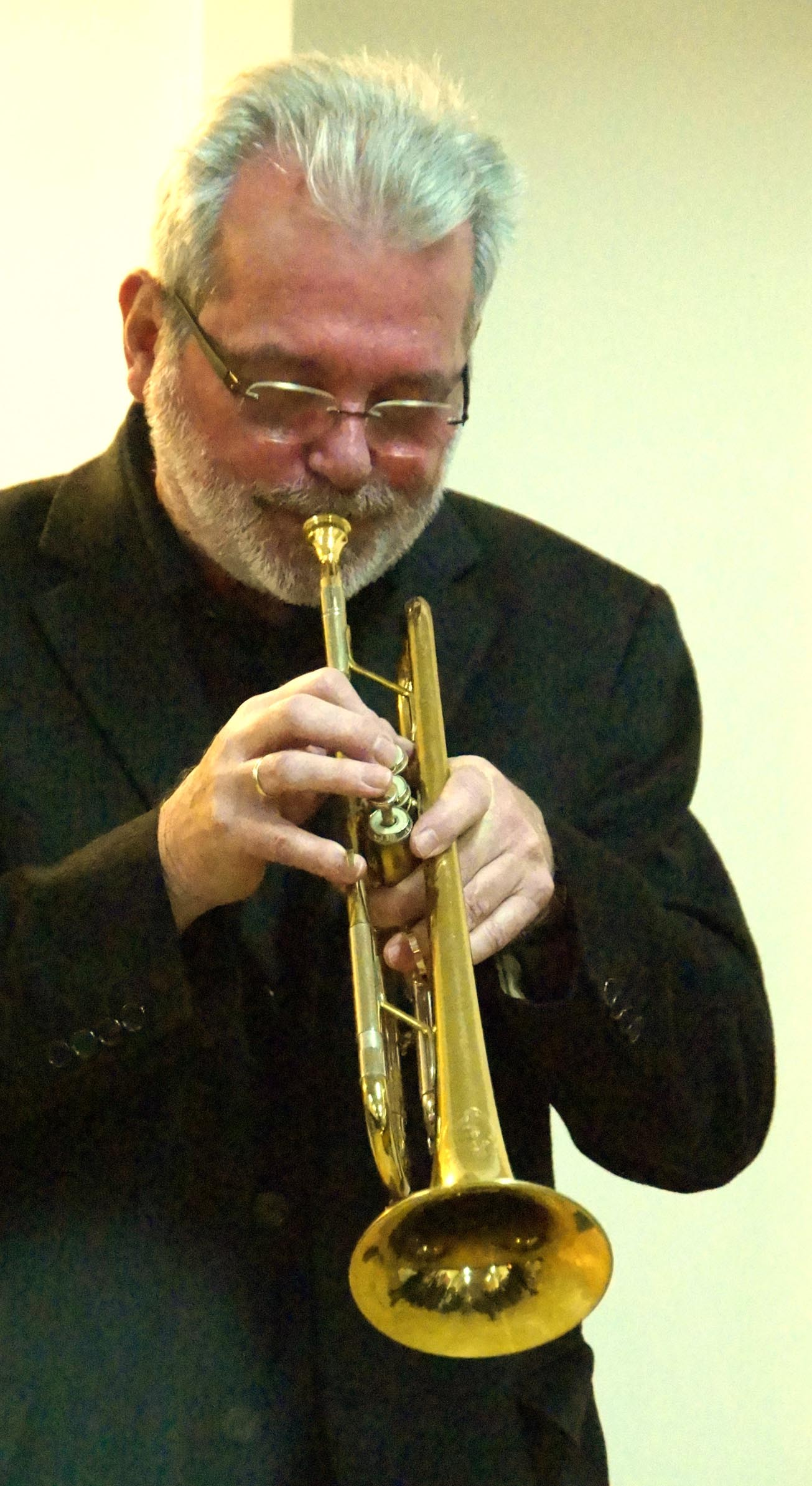 Vienna 2013-12-10 CZ center Vernissage Ondrej Kohout 010 Sepp Mitterbauer e